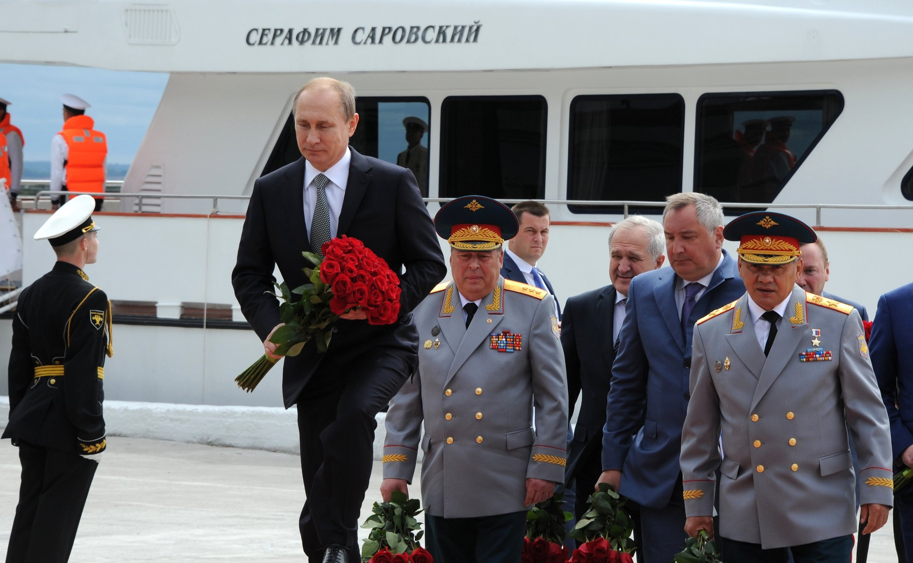 Президент России Владимир Путин на Дне Военно-Морского Флота России в Балтийске